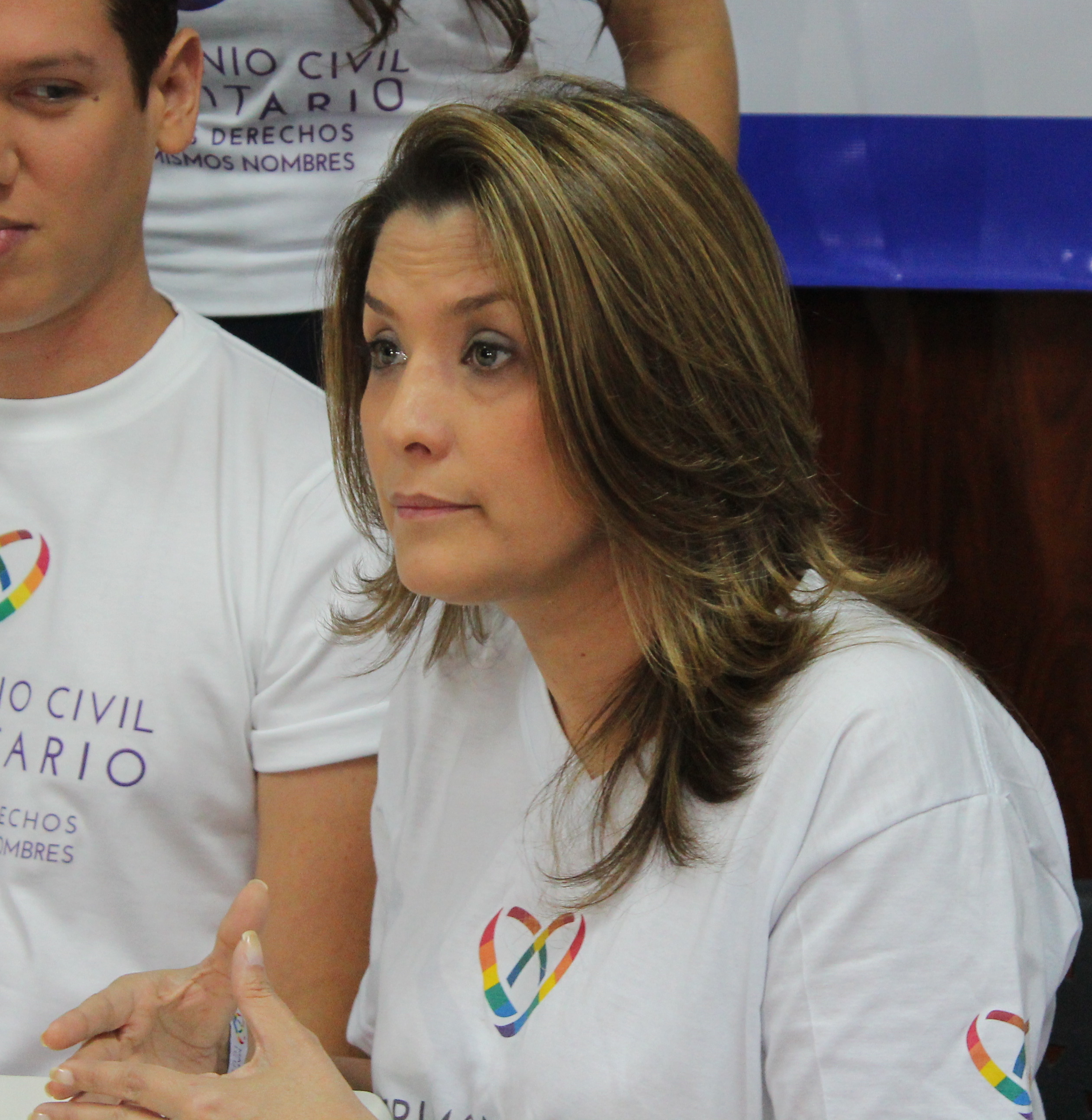 Rueda de prensa para anunciar boda de Santiago Vinces y Fernando Saltos.